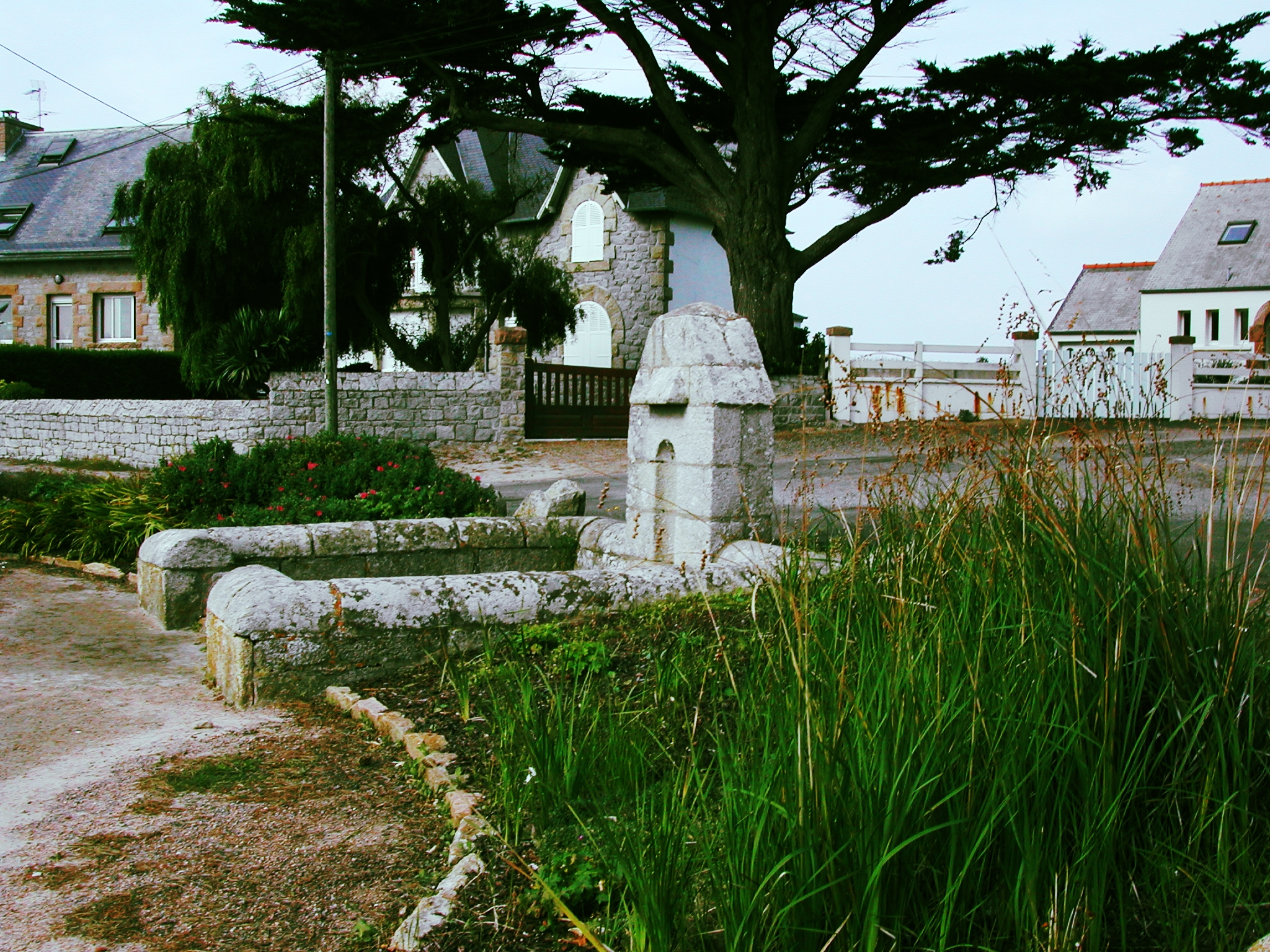 Île-Grande quartier de Pleumeur-Bodou dans les Côtes-d'Armor :fr: Bretagne [Bretagne